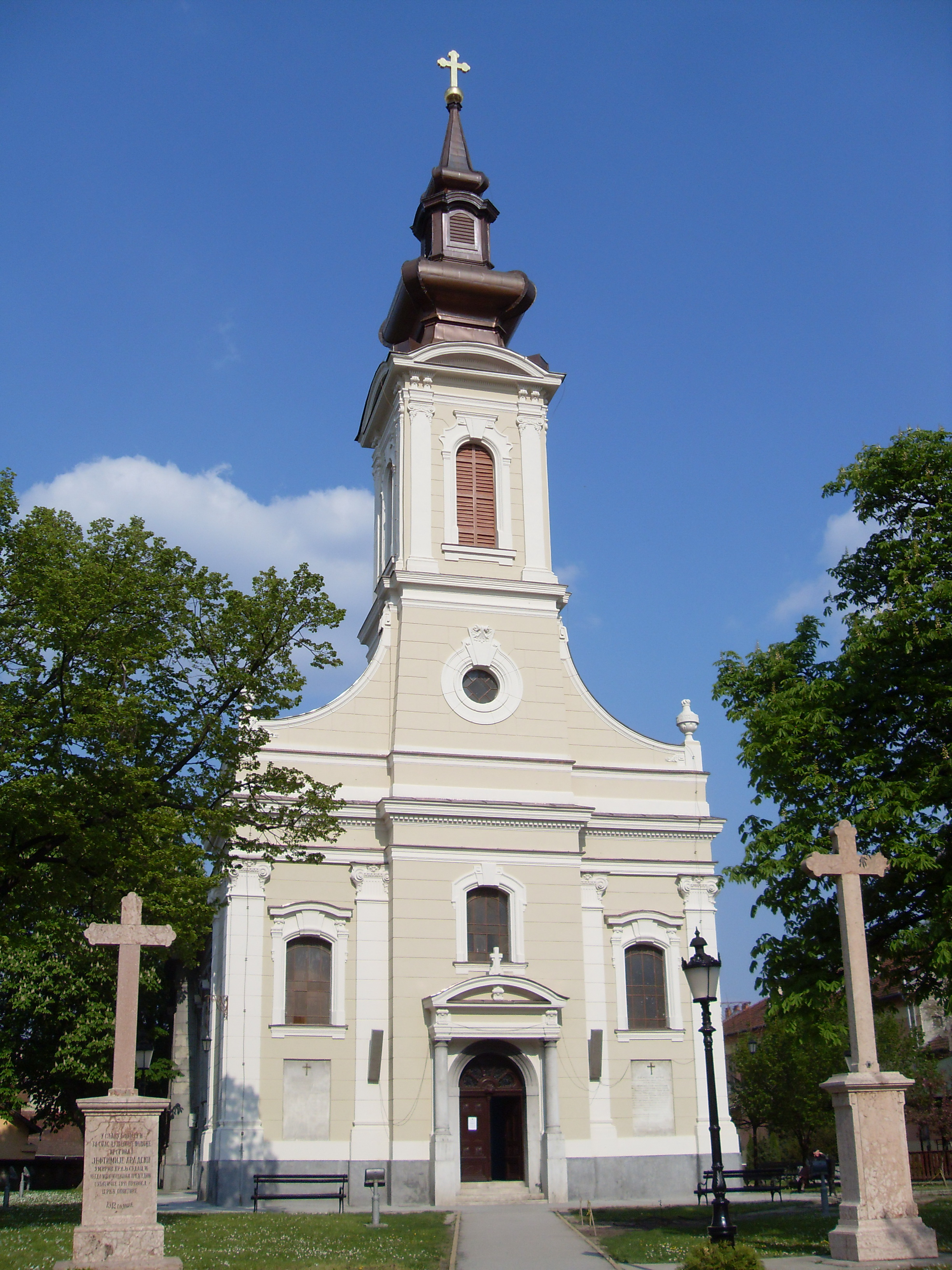 Српска православна црква Вазнесења Господњег у Суботици.